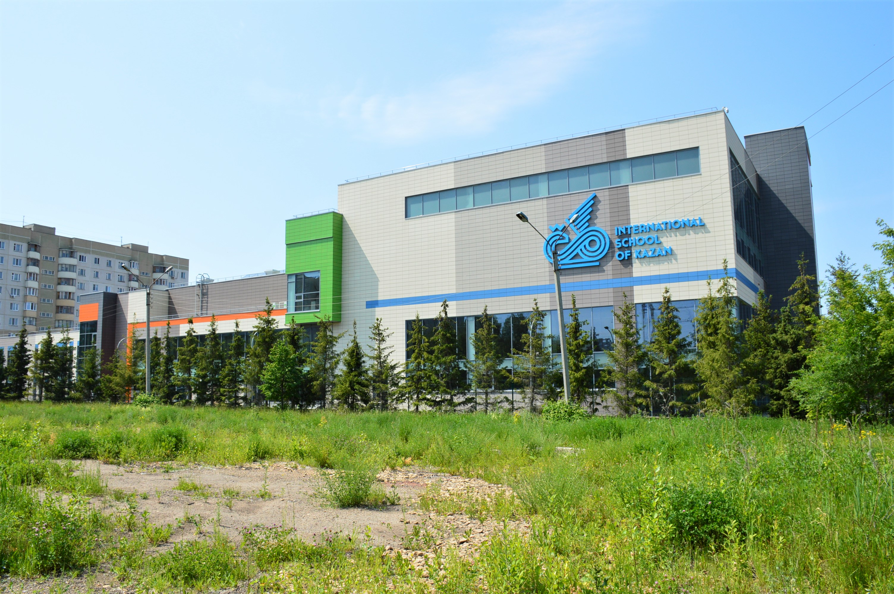 Казань. Главный корпус Международной школы Казани (ул. Хусаина Мавлютова, 5): вид со стороны улицы Рихарда Зорге